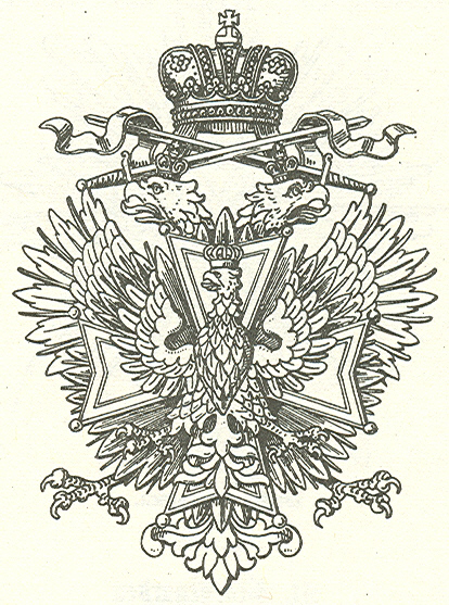 Kruis met zwaarden van de Orde van de Witte Adelaar prent uit 1893